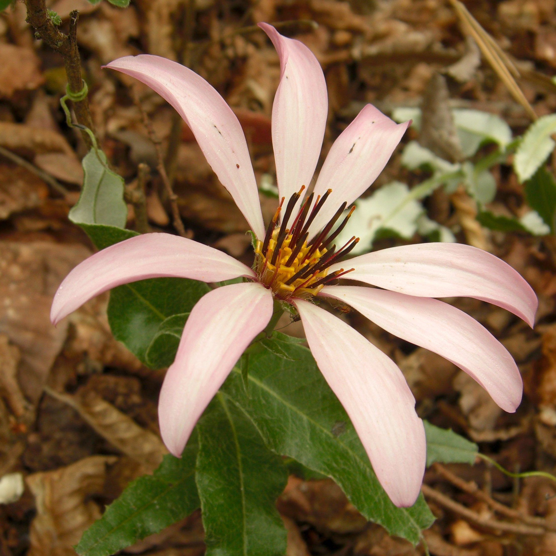 Mutisia spinosa var. pulchella 20081128.6 Reserva Nacional Los Ruiles, Chile (Common name is really "Clavel del Campo".)